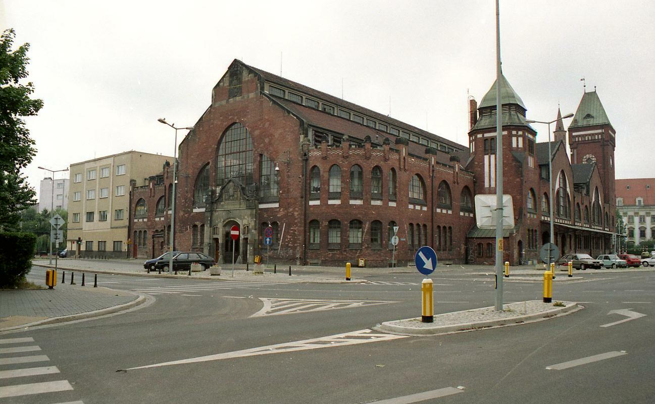 Hala Targowa w lipcu 2002 roku. Widzicie sami, że Neo od urodzenia robił piękne zdjęcia i nie wie nawet, co to znaczy zrobić knota ;)